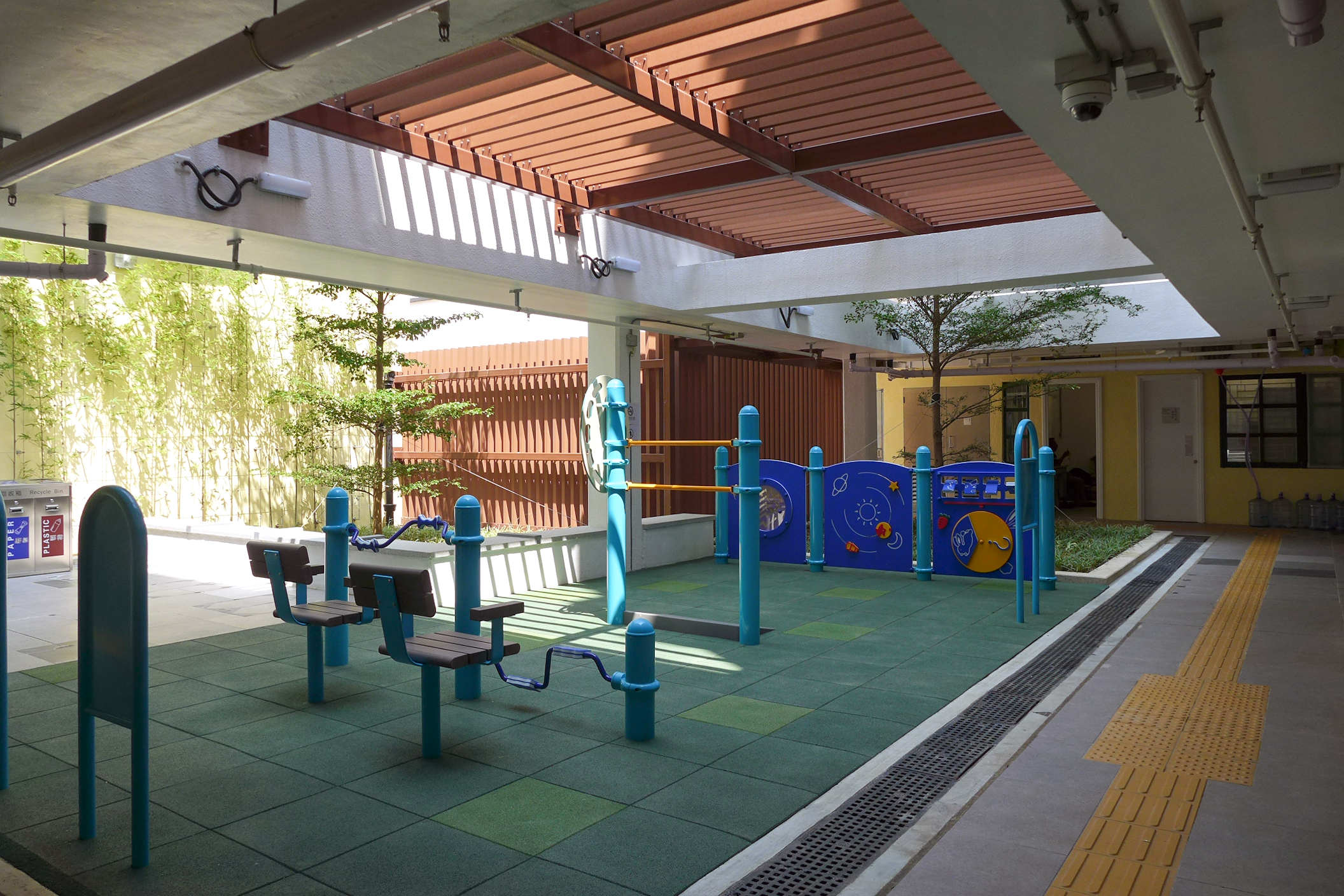 Wah Ha Estate